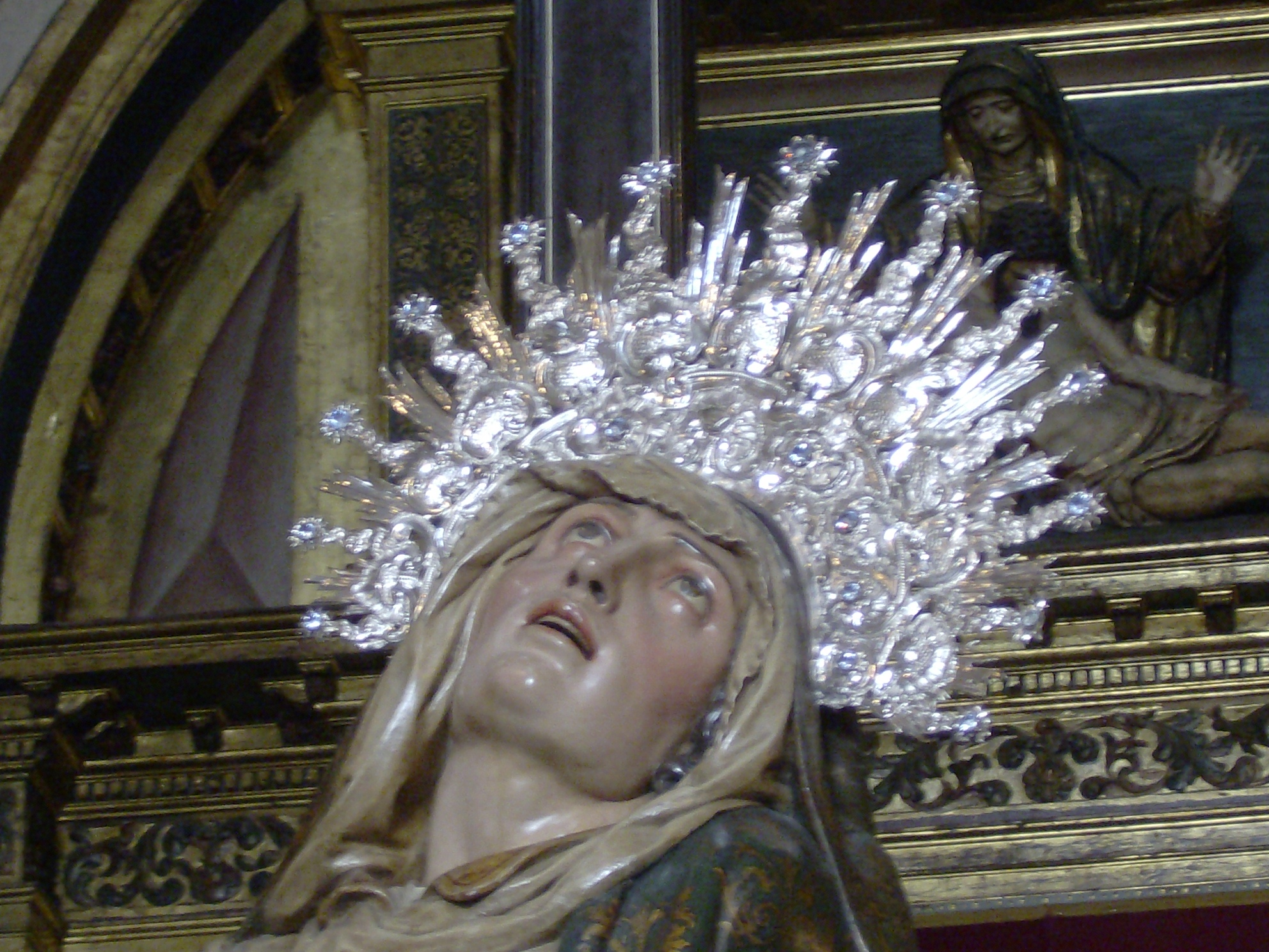 Nta. Señora de las Angustias (Juan de Juni)